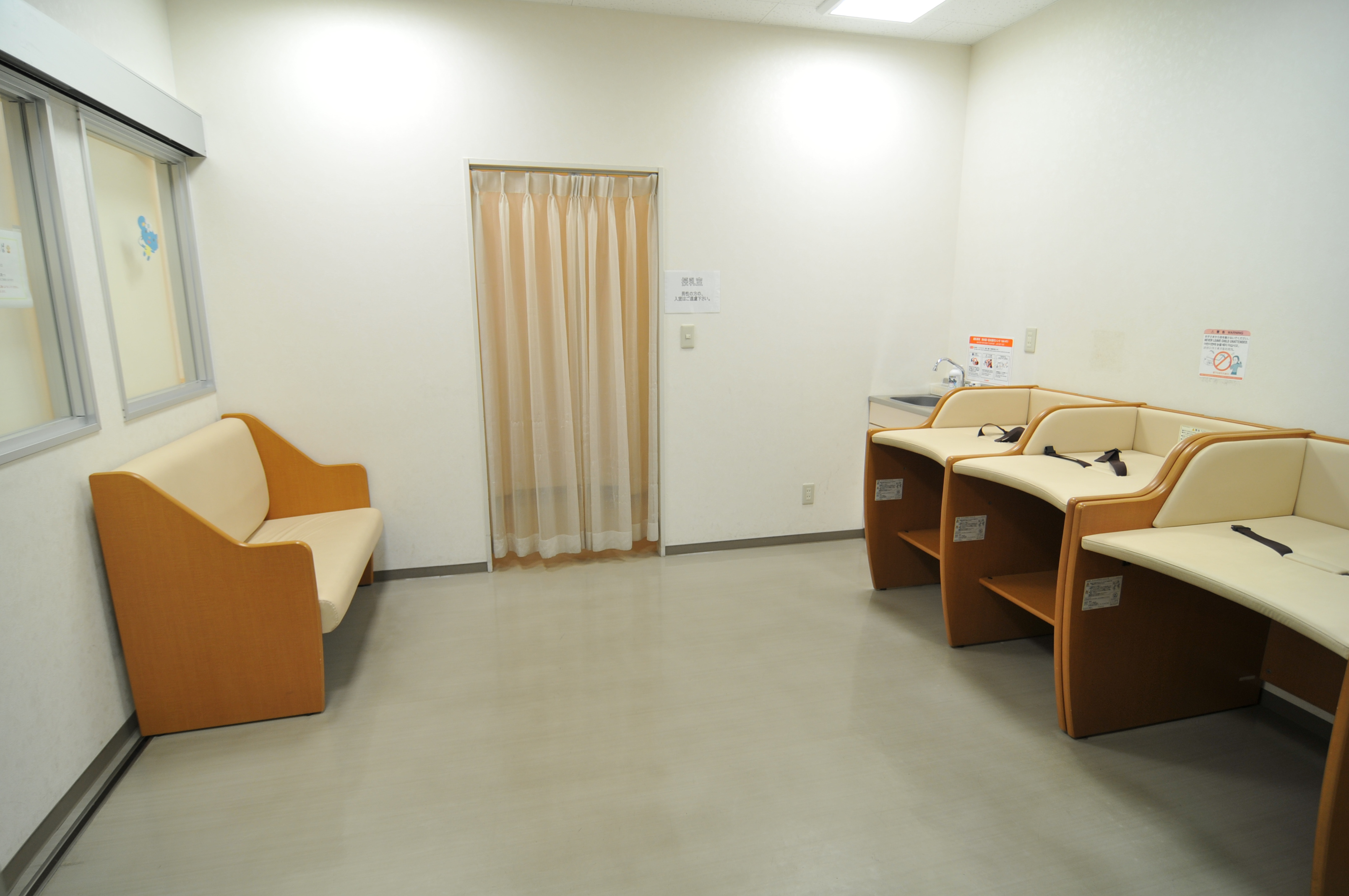 成城コルティベビー休憩室